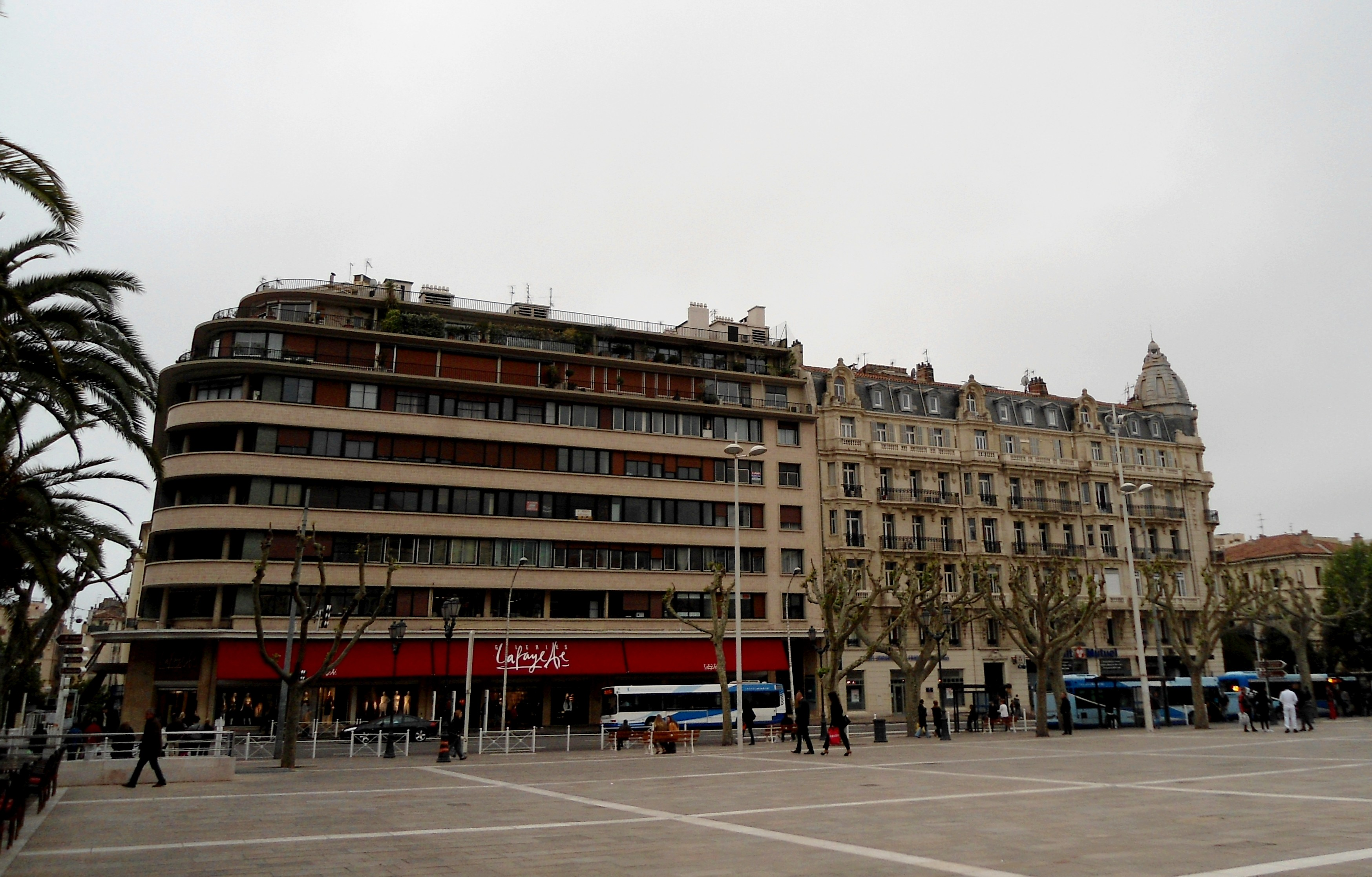 Bastiment remplaçant l'ancian magasin Ai Dònas de França, Tolon